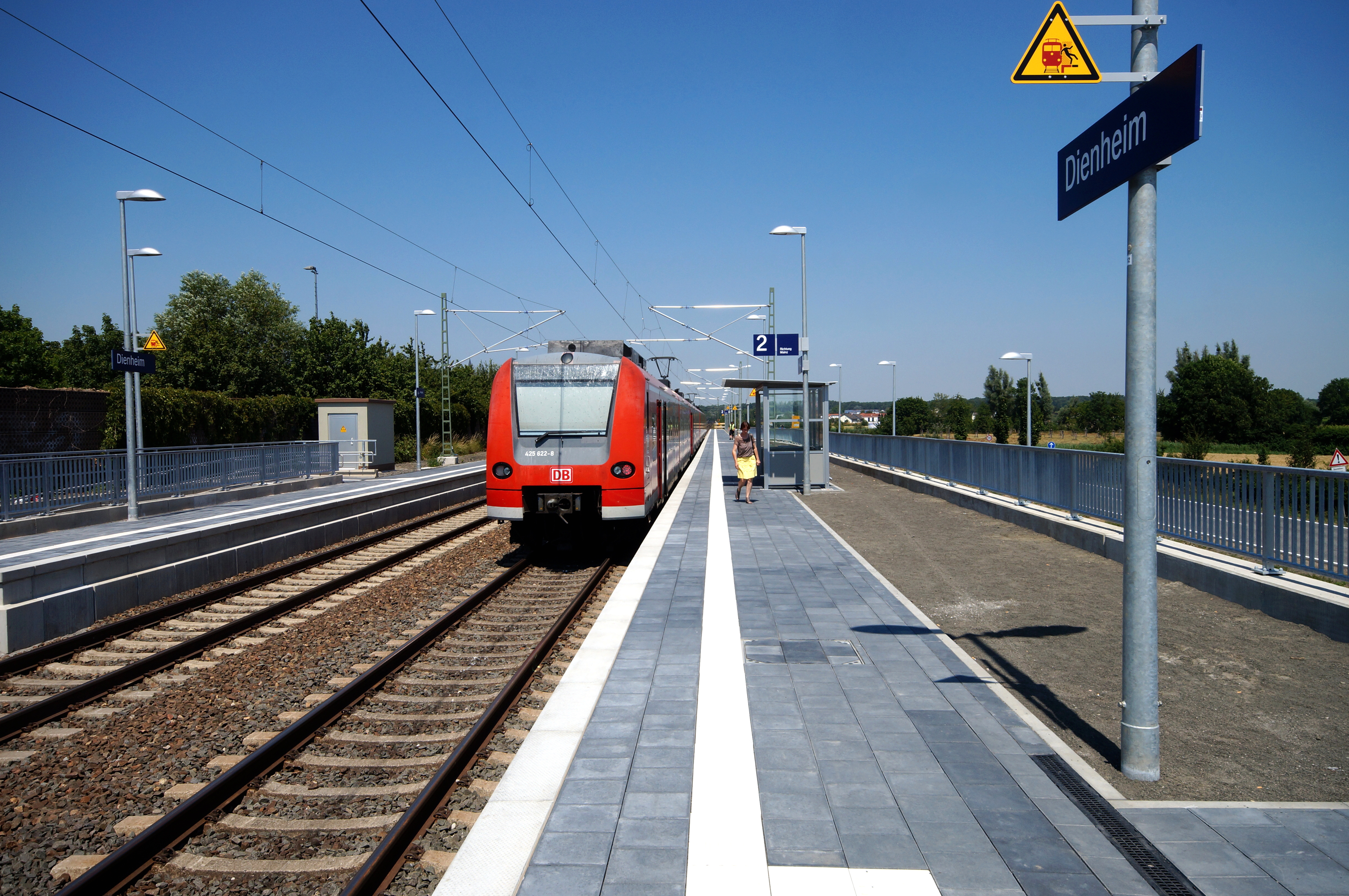 Eine Regionalbahn mit einem Triebwagen der DB-Baureihe 425 am Haltepunkt Dienheim auf der Bahnstrecke Mainz–Ludwigshafen auf dem Weg nach Mainz, der zum Fahrplanwechsel am 14. Juni 2015 um 00:00 Uhr in Betrieb genommen wurde